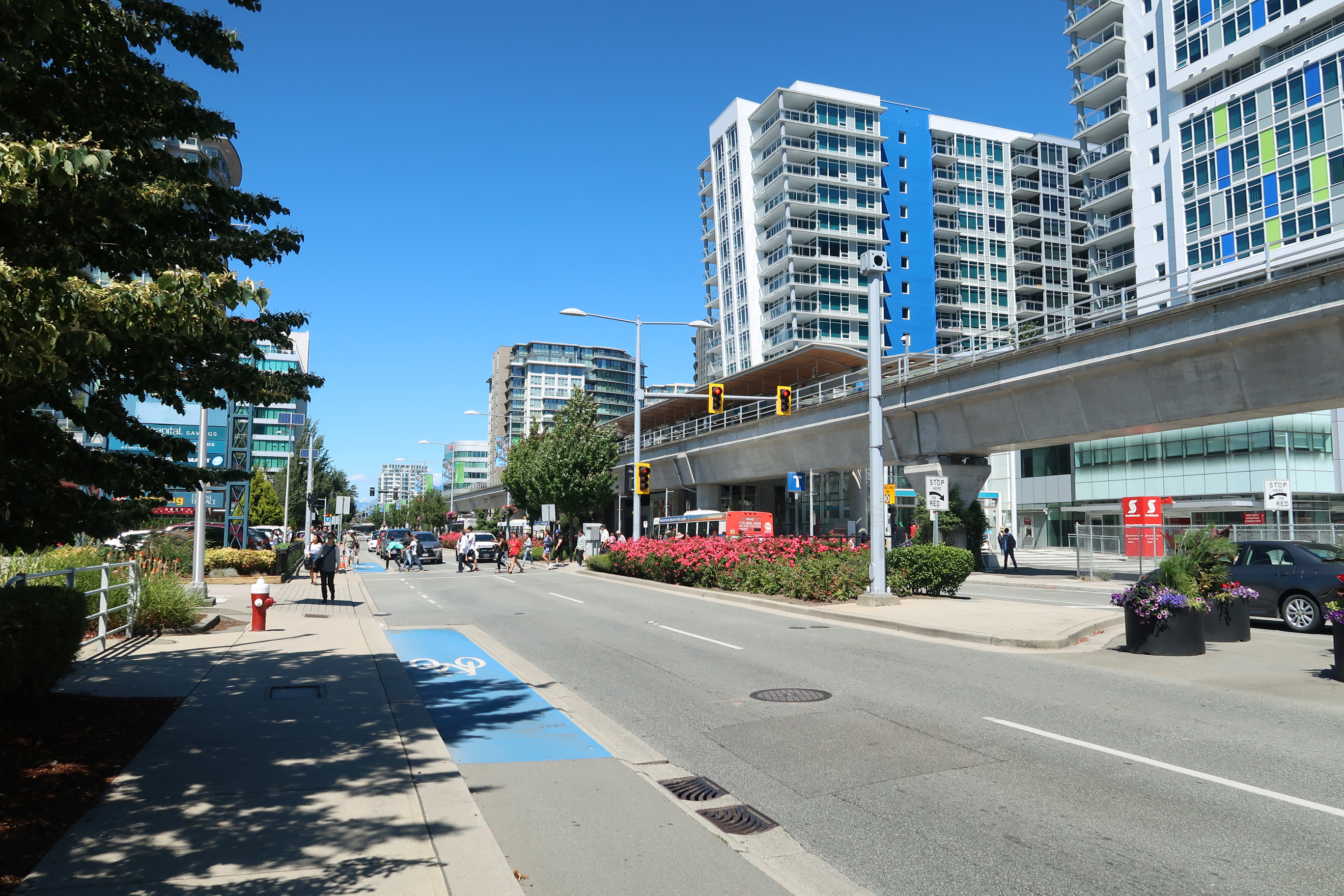 No 3 Rd Richmond, BC